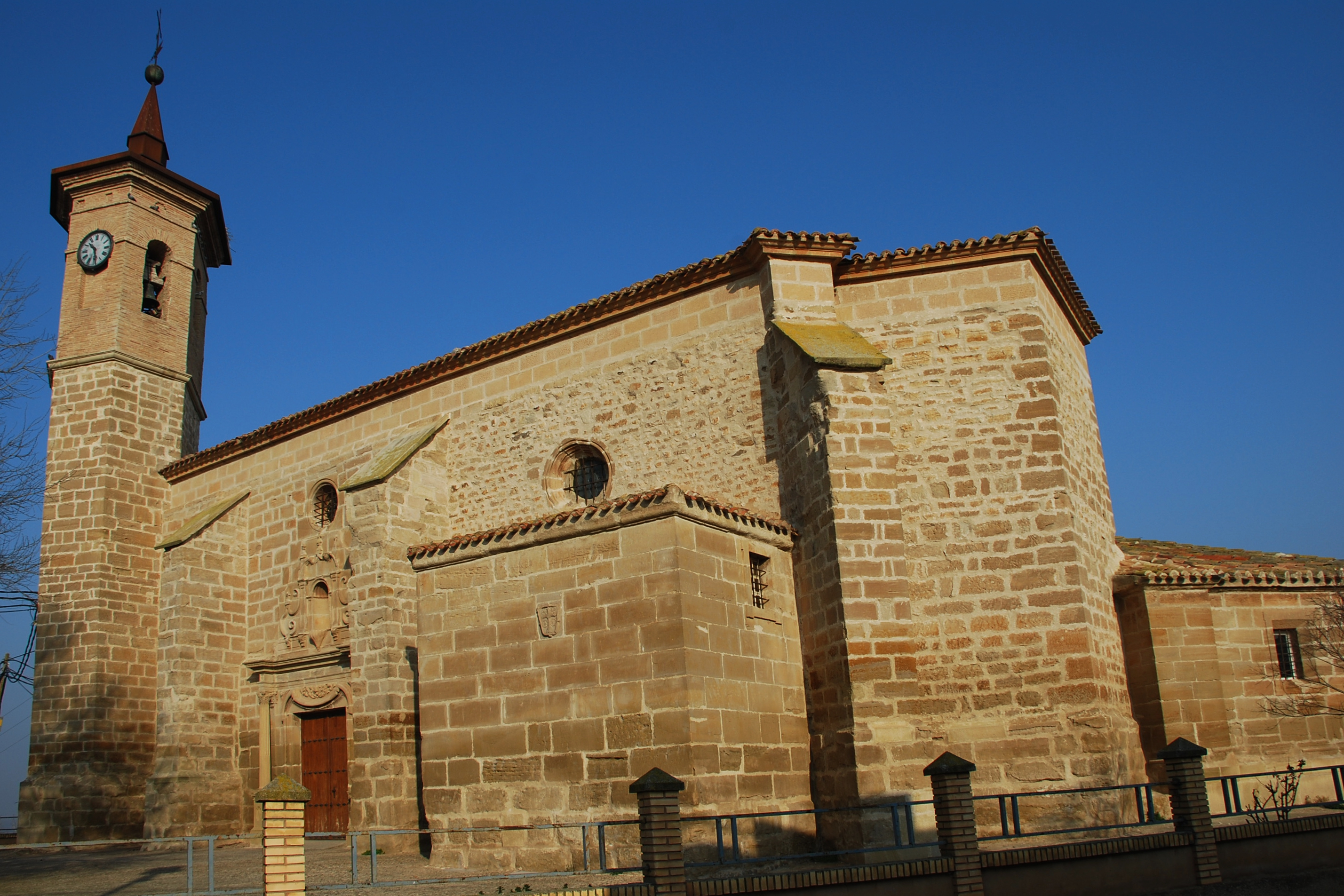 Iglesia de San Salvador (S. XVI) en Arrúbal, La Rioja (España)